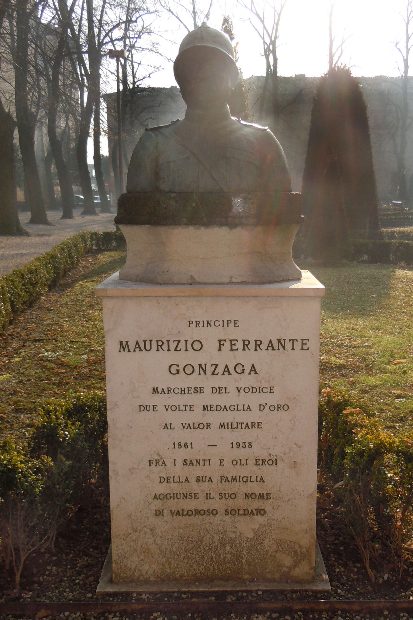 Mantova, monumento a Maurizio Ferrante Gonzaga.